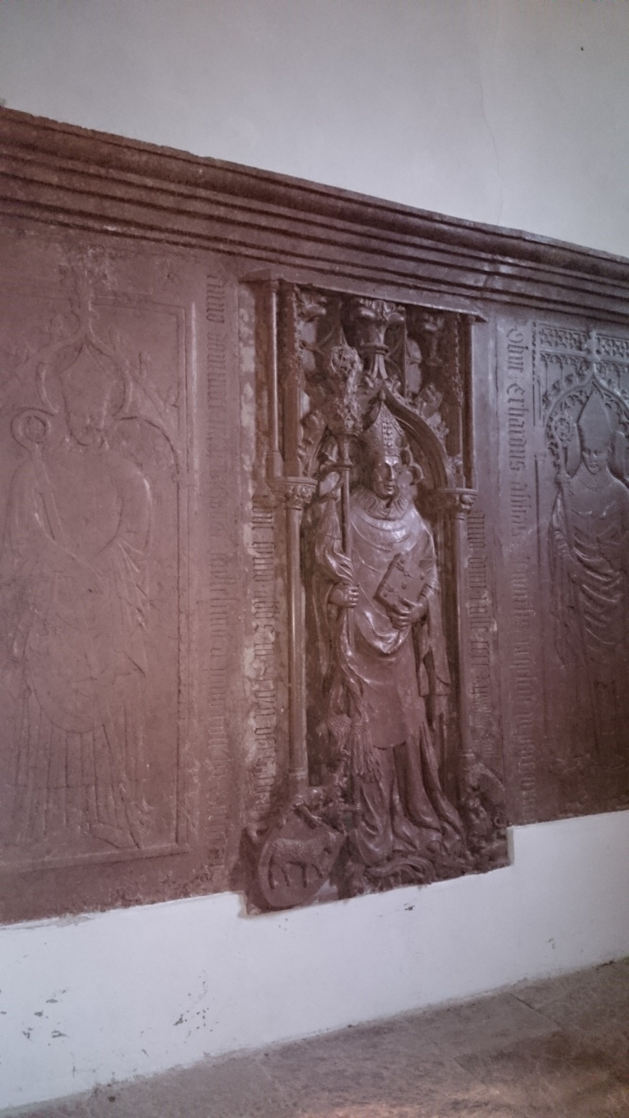 Kloster Seeon